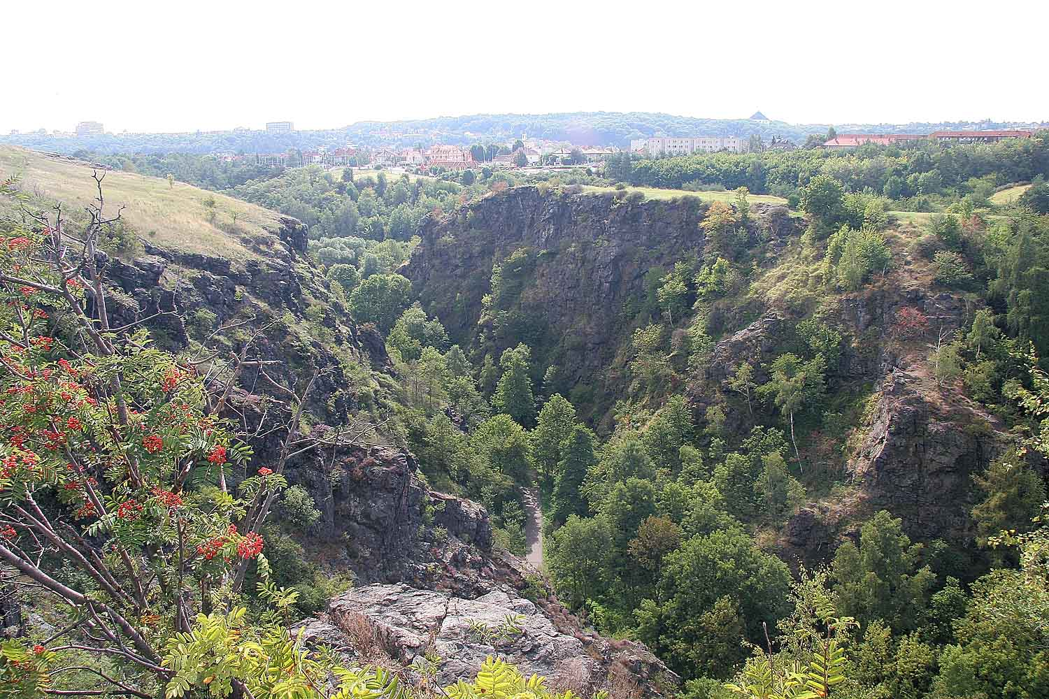 PR Divoká Šárka - údolí Džbán, Praha, Czech Republic autor:Prazak Date: 2. 9. 2006